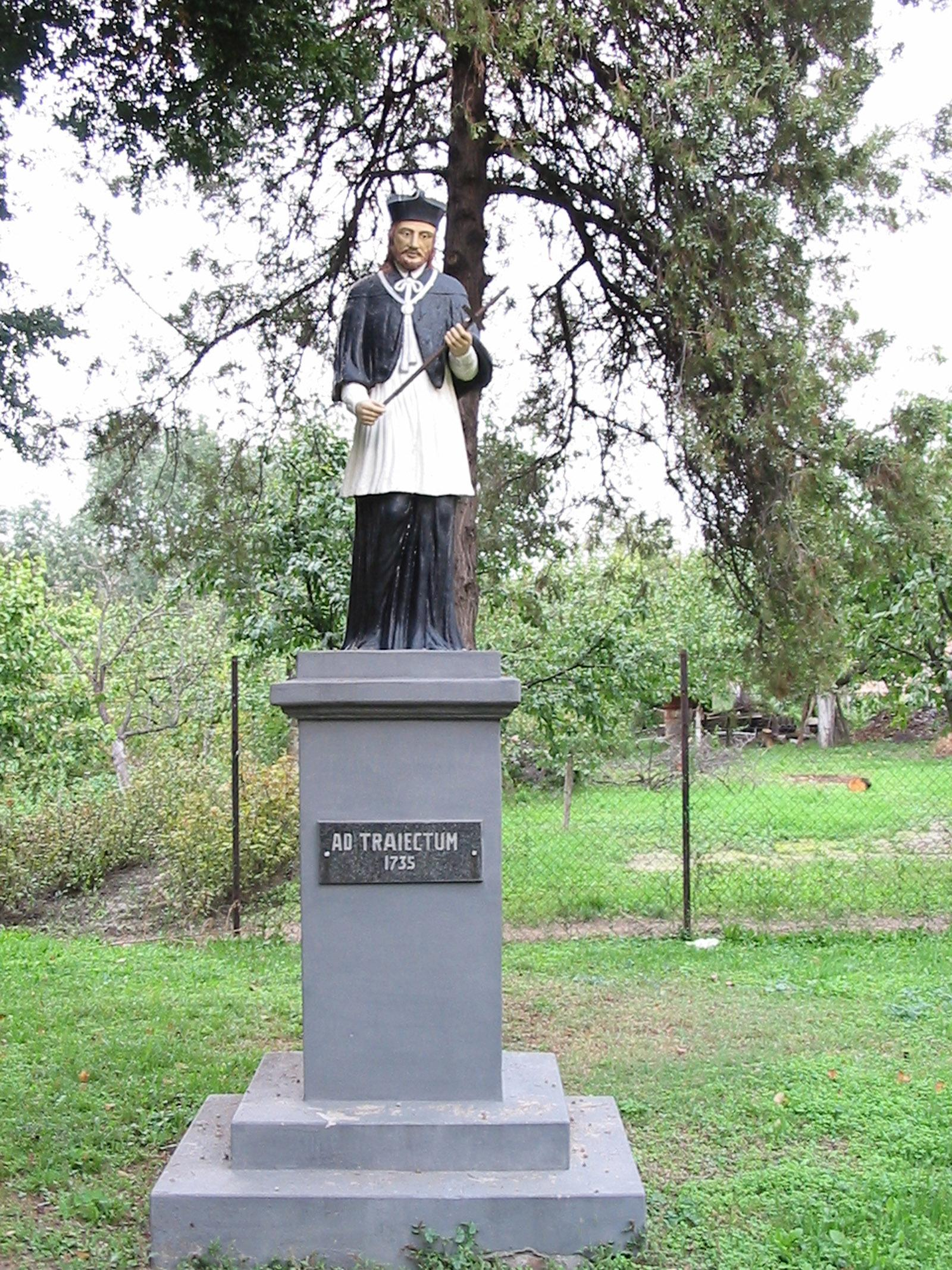 Kip Ivana Nepomuka u dvorištu crkve Uzvišenja sv. Križa u Petrovaradinu